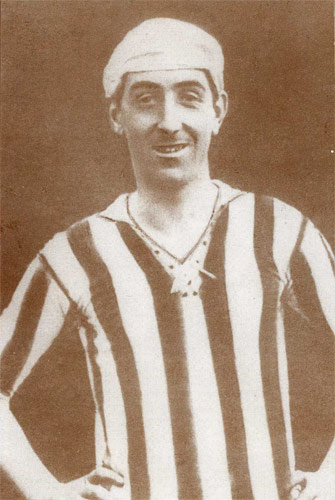 Rafael Moreno »Pichichi« (1892-1922)